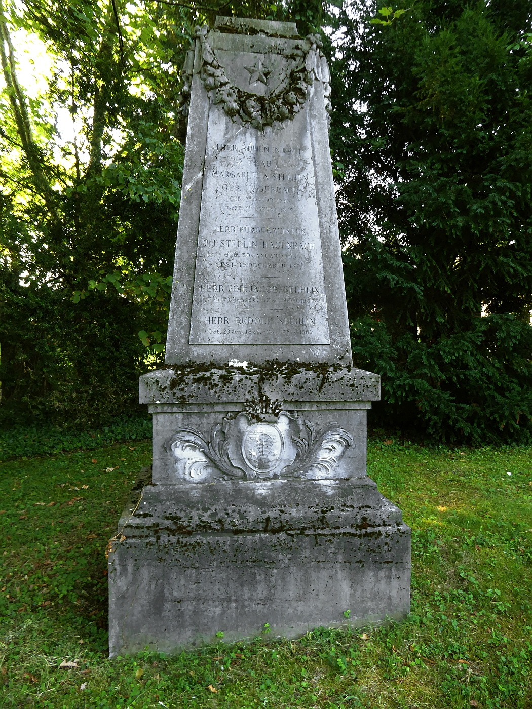 Johann Jakob Stählin (1803-1879) Bürgermeister, Politiker, Margaretha Stehlin-Hagenbach (1803-1878), Johann Jakob Stehlin (1856-1881), Rudolf Stehlin (1859-1885), Familiengrab auf dem Friedhof Wolfgottesacker, Basel